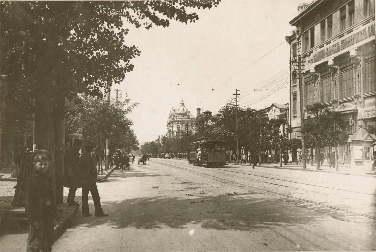 Трамвай на Большой садовой улице в Ростове-на-Дону